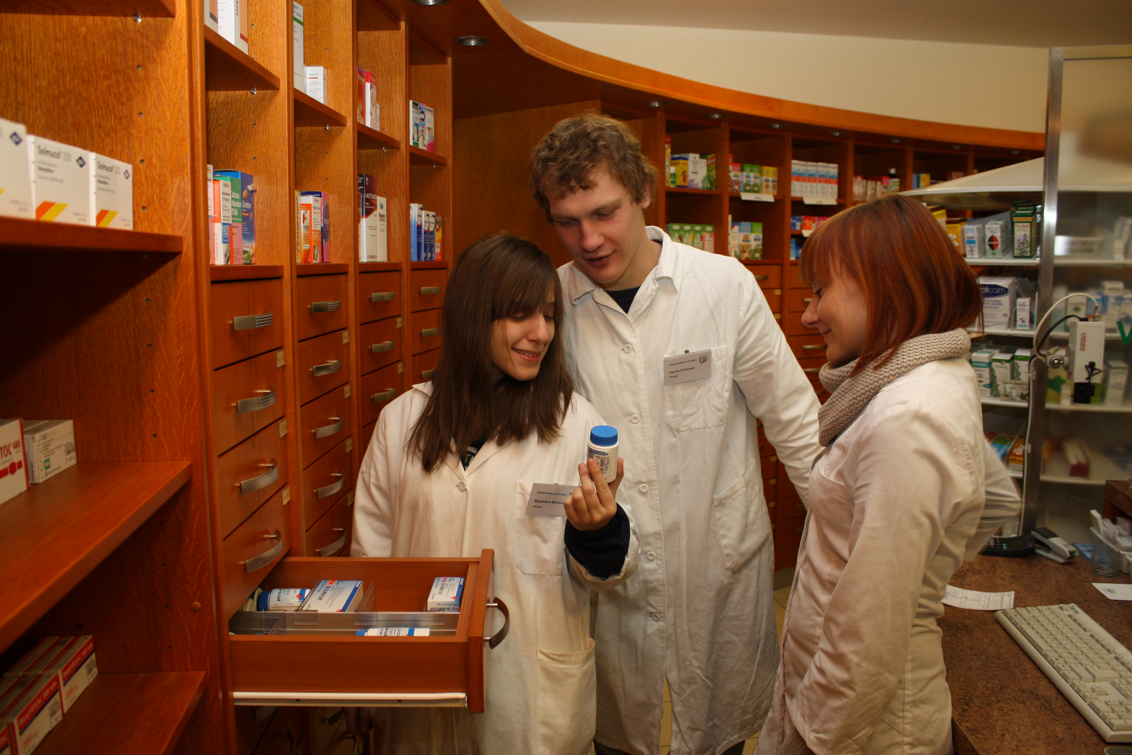 Studenti farmacie na praxi v univerzitní lékárně